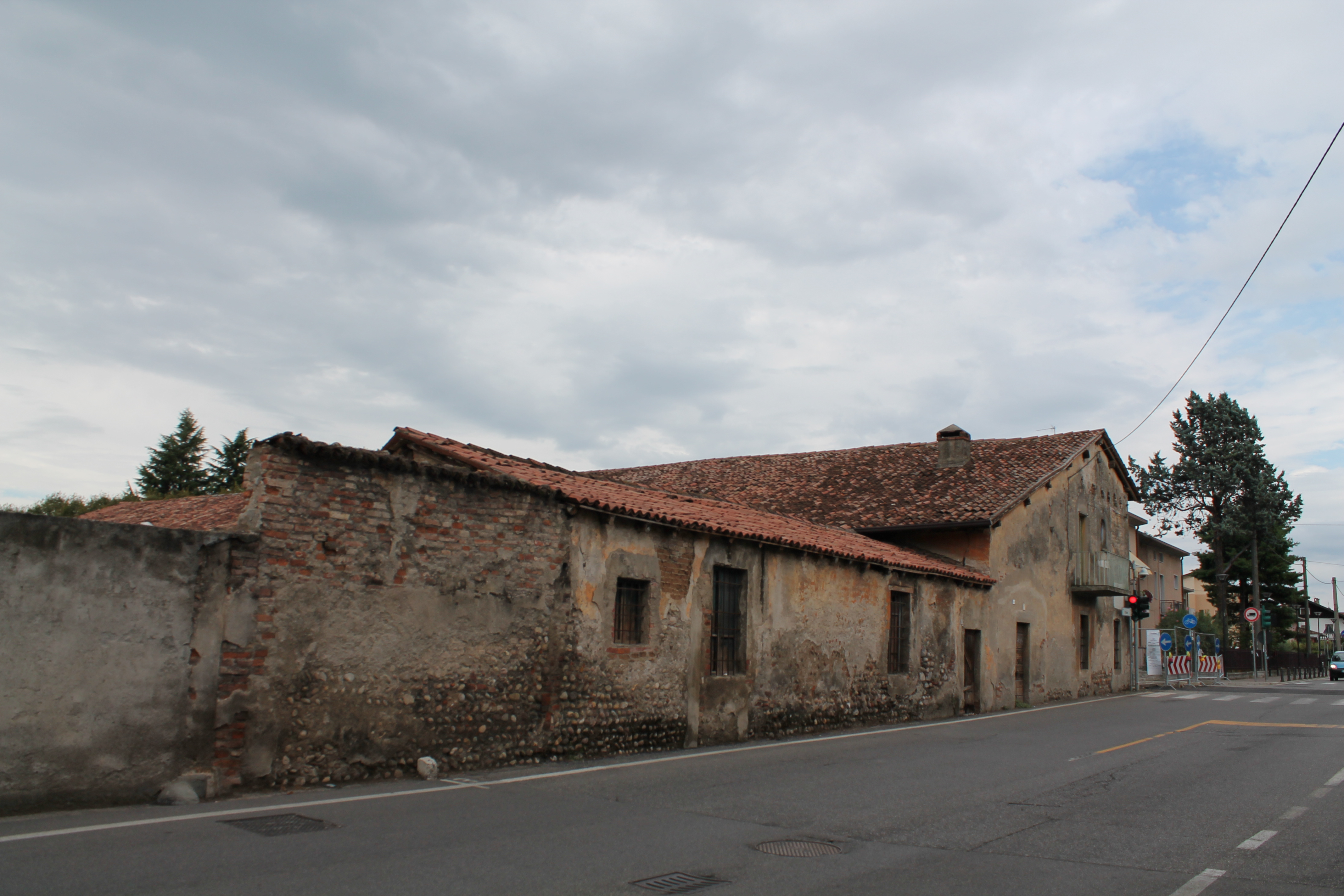 Vecchia cascina castelcovatese.